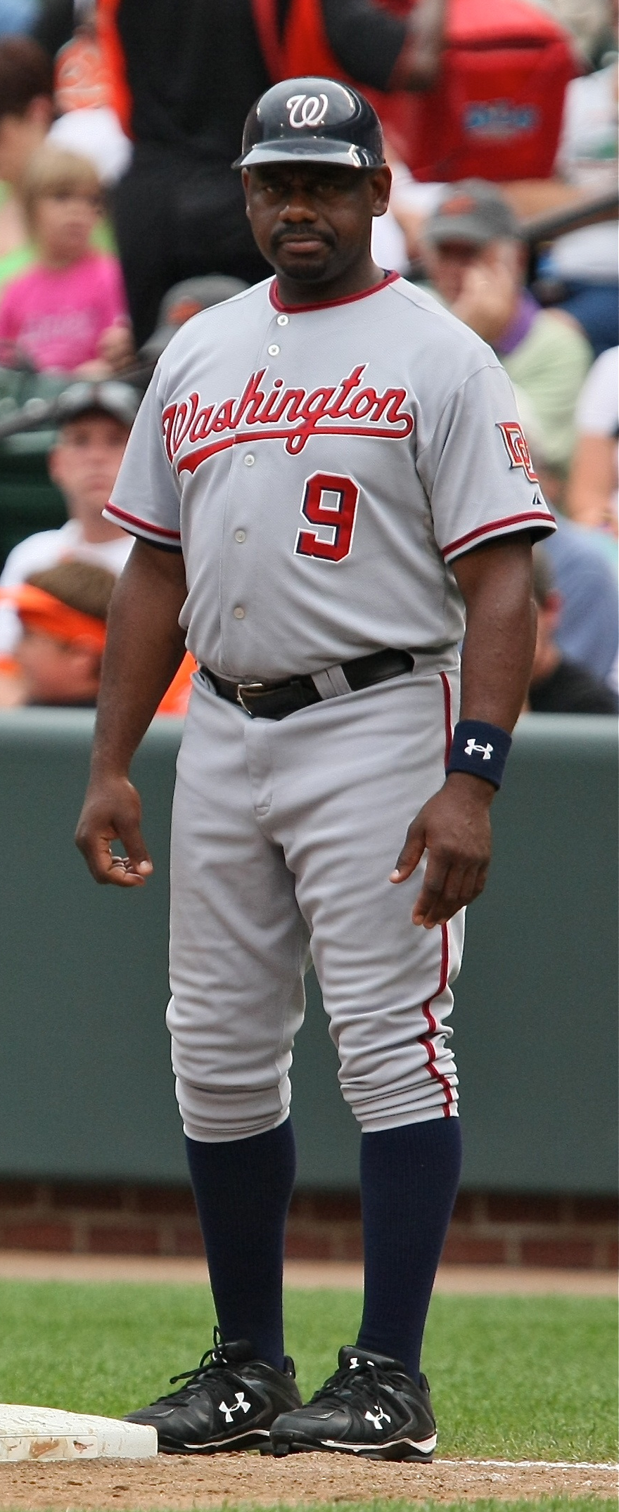 Marquis Grissom